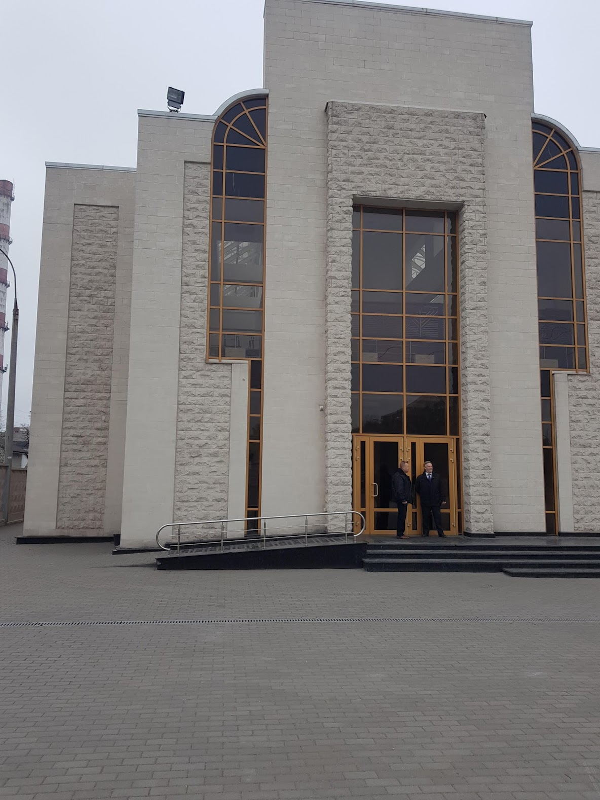 זה בית הכנסת החדש בעיר זאפורוז׳יה באוקראינה . בית הכנסת נבנה על ידי שליח חב״ד בעיר הרב נחום ערנטרוי. אדריכל המבנה הוא אהרון אסטרייכר